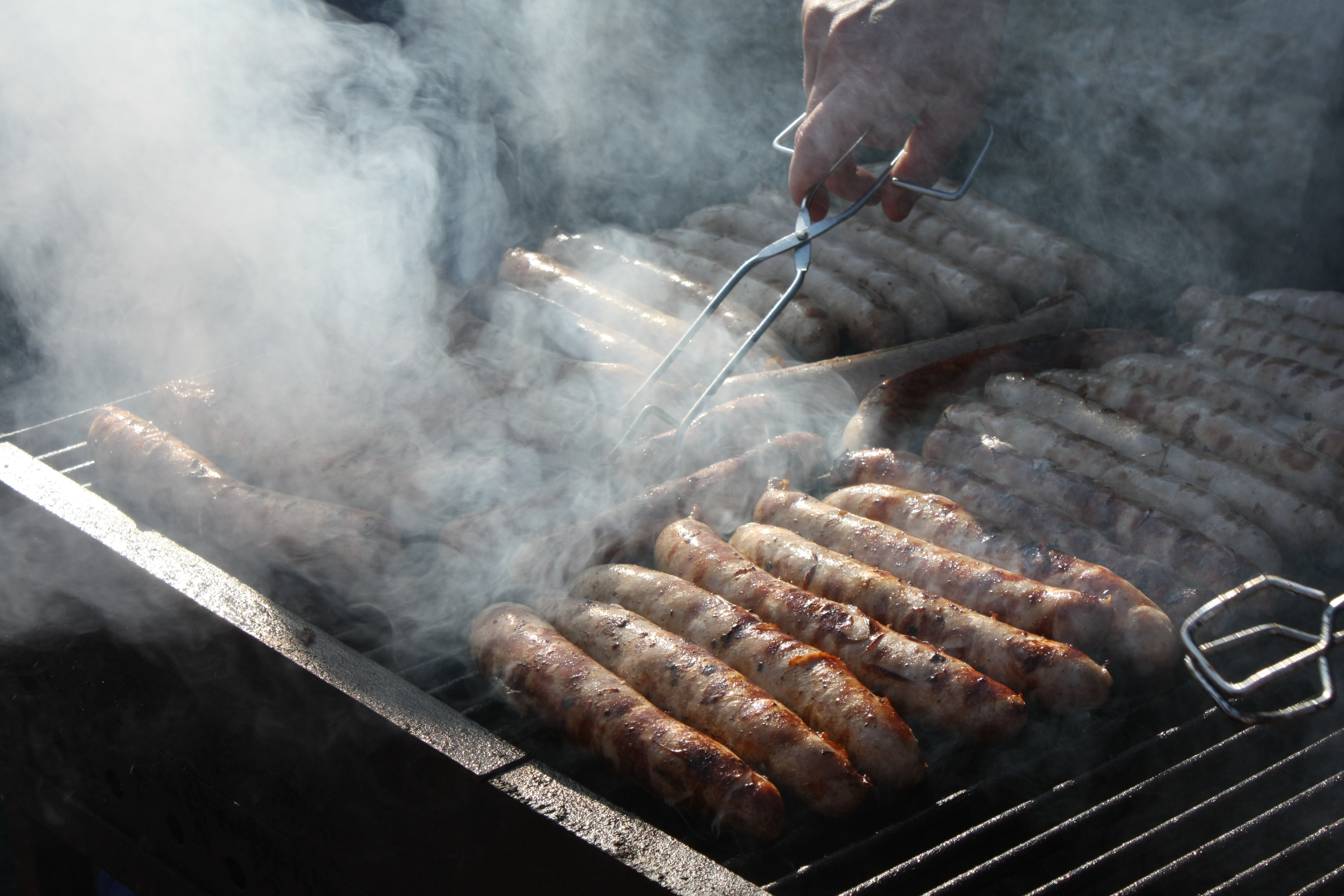 Braten von Thüringer Rostern in Rudolstadt anläßlich einer Veranstaltung der Feuerwehr